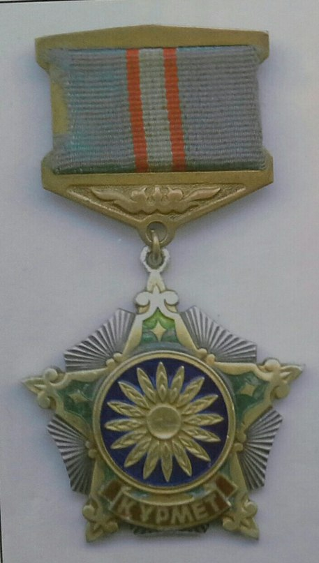 Қазақша (кирил): "Құрмет" ордені